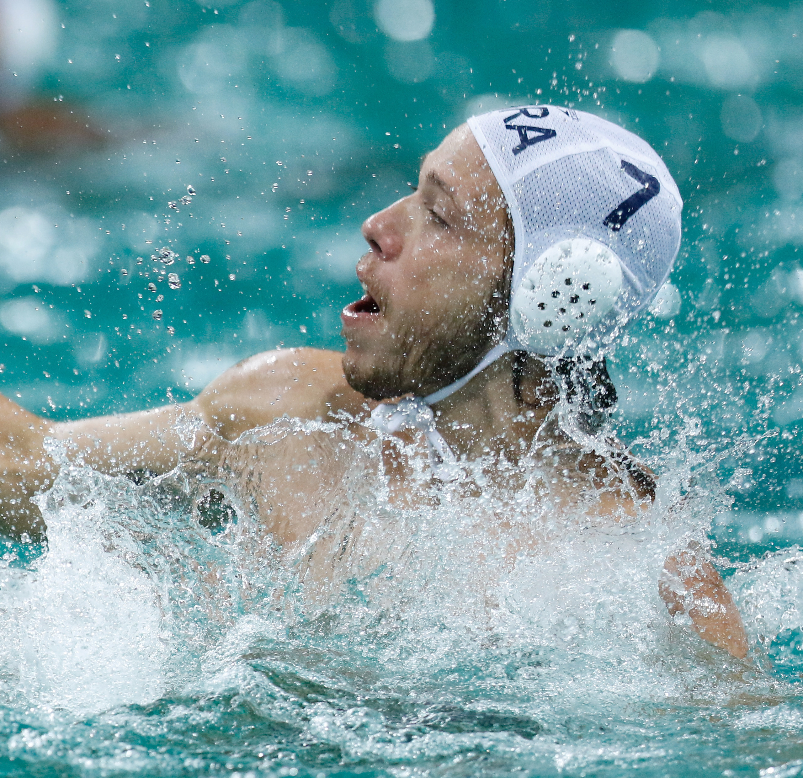 Rio de Janeiro - Seleção masculina brasileira de polo aquático vence a da Sérvia por 6 a 5 nos Jogos Olímpicos Rio 2016, no Parque Aquático Maria Lenk (Fernando Frazão/Agência Brasil)